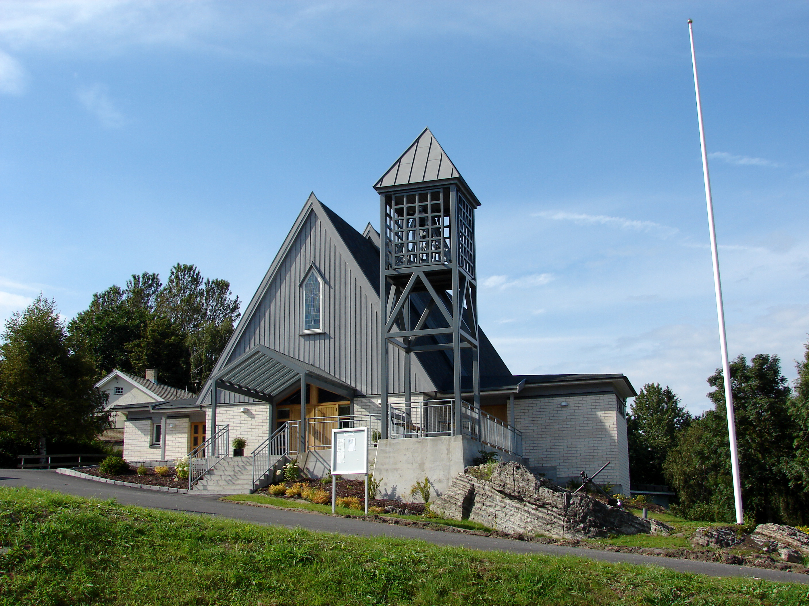 Stathelle Kirke, Grenland, Telemark